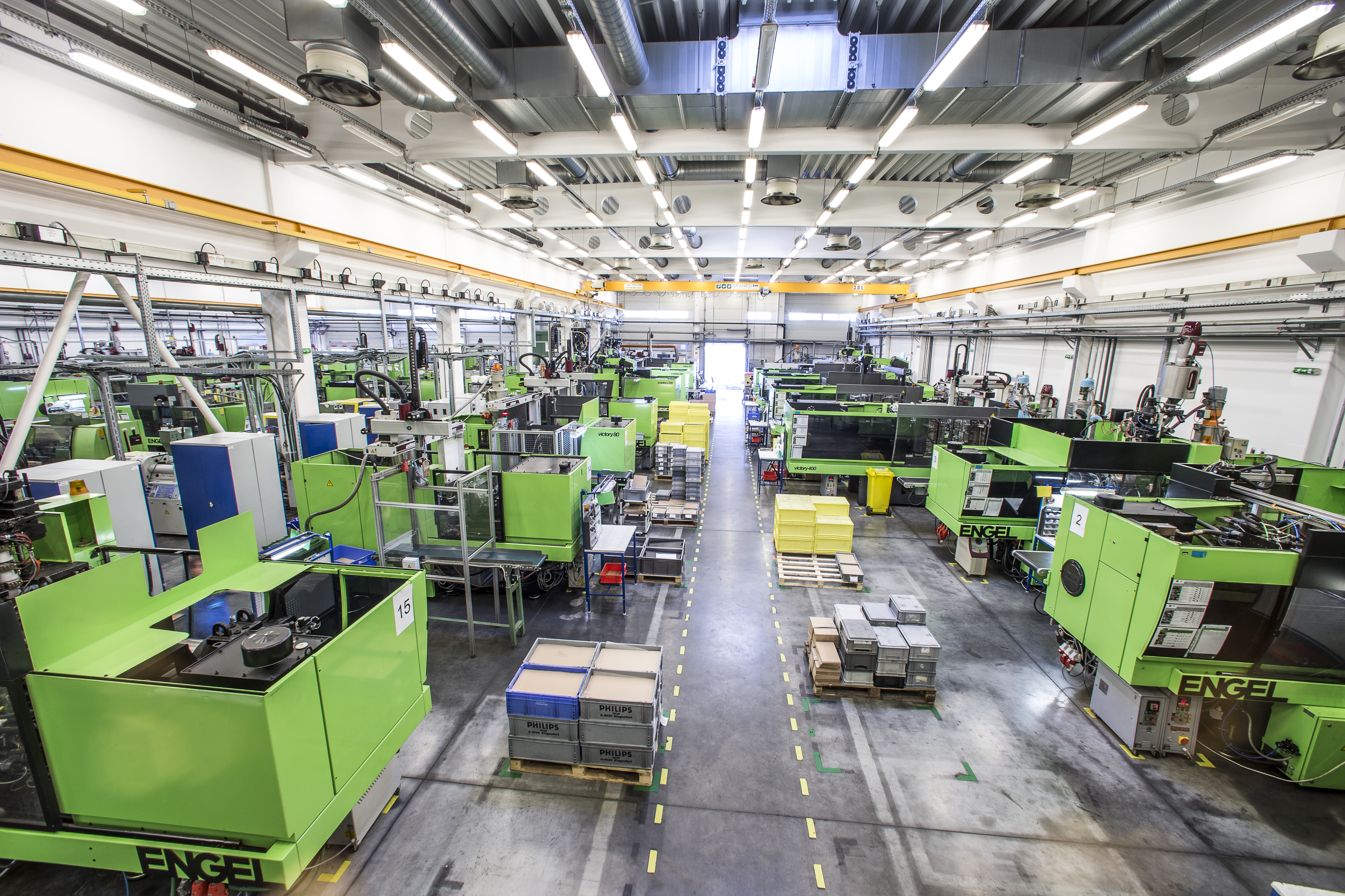 Spritzgussmaschinen